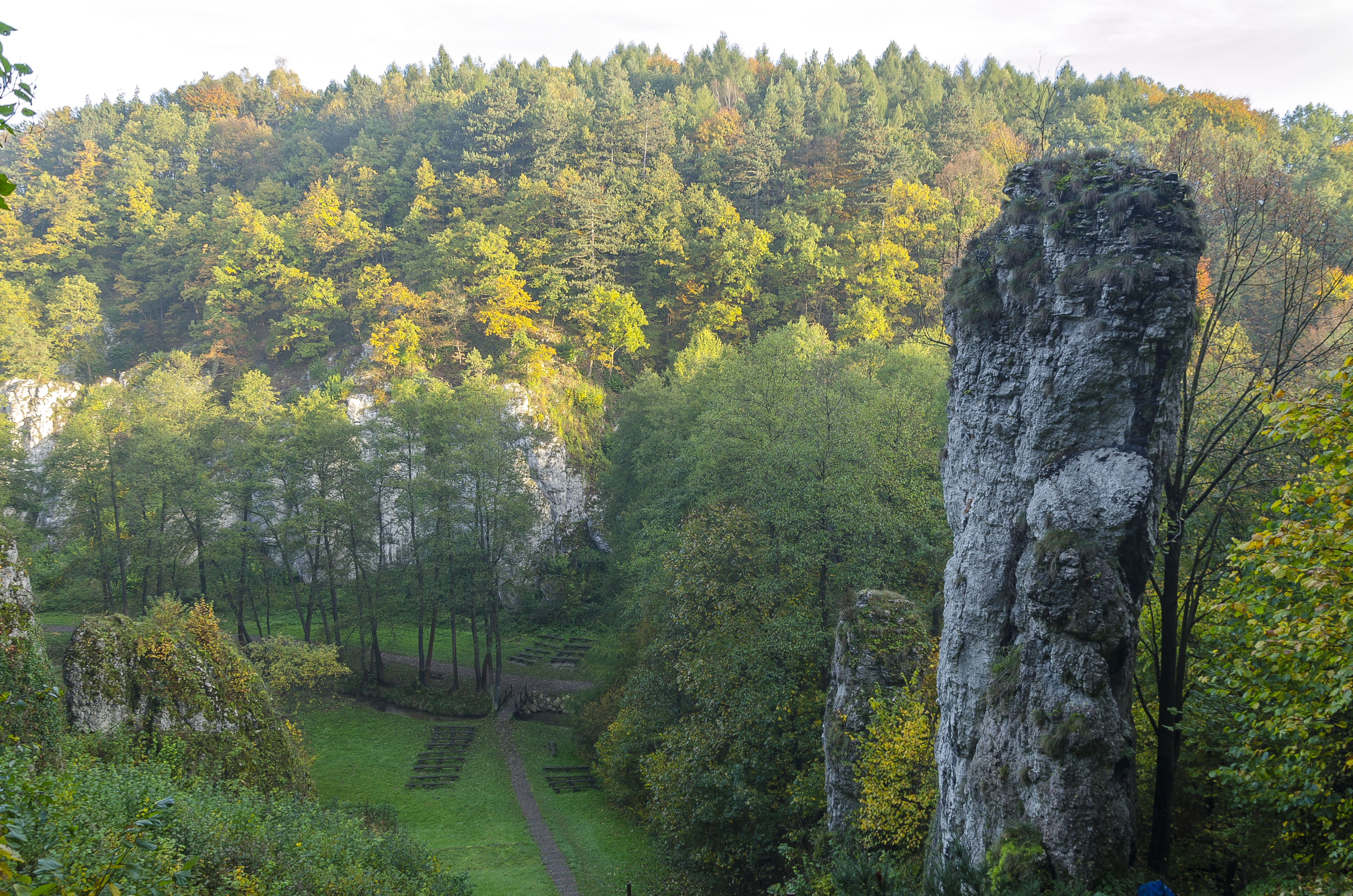 Mników, Poland